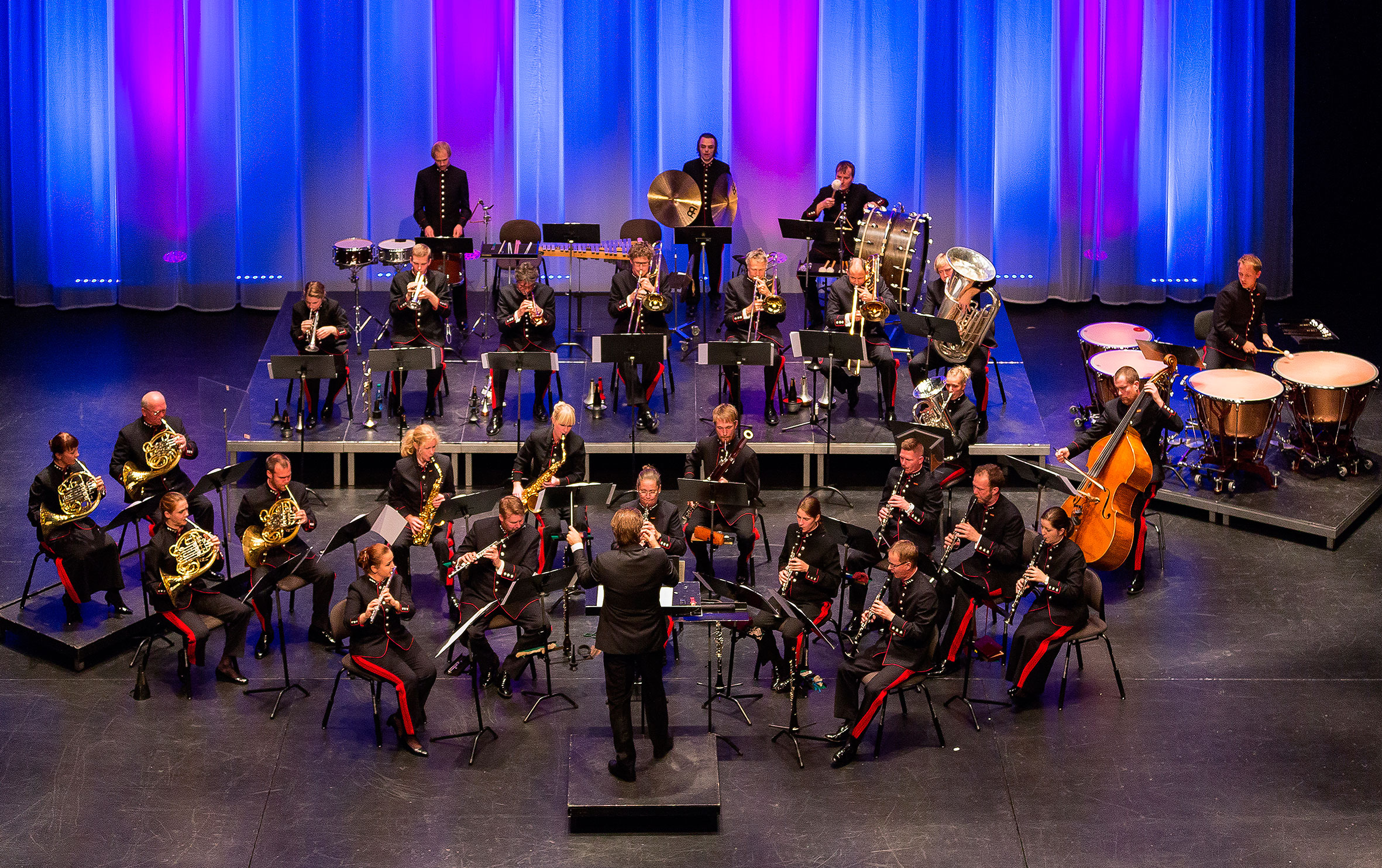 Forsvarets musikkorps Nord-Norge i Harstad kulturhus